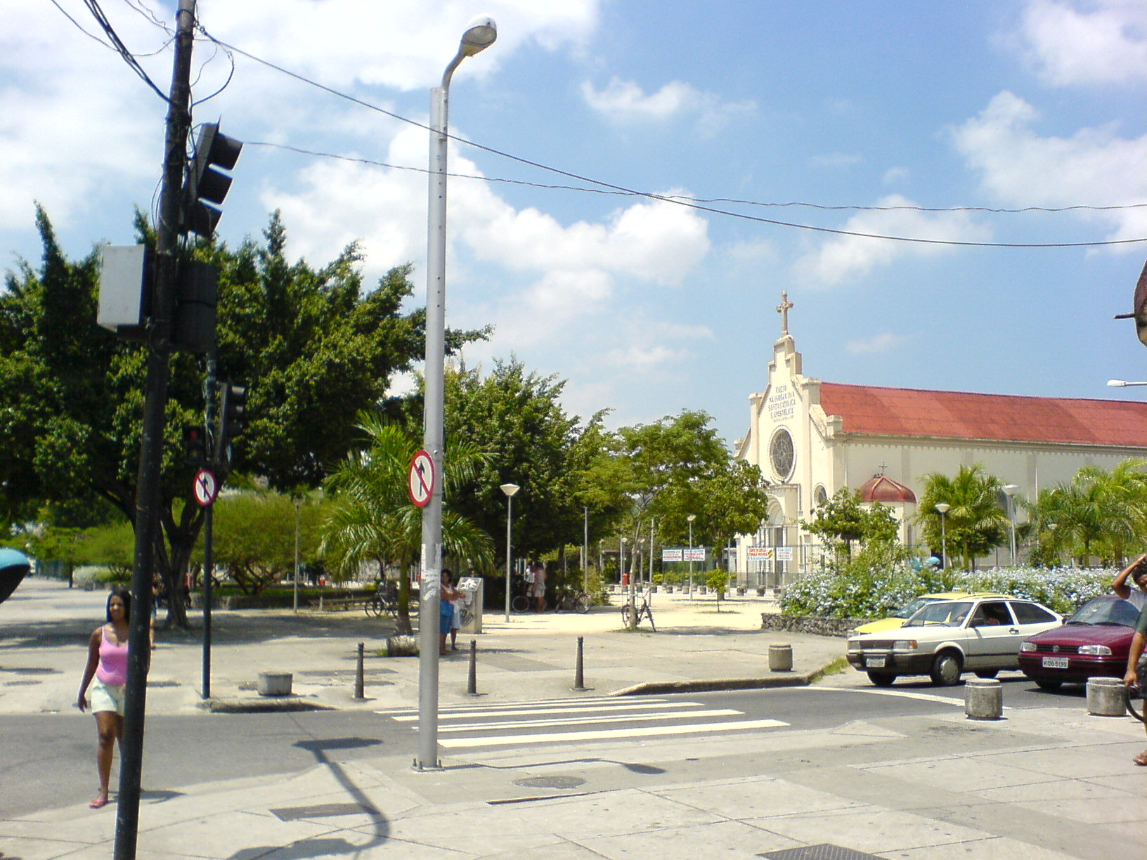 Imagem da Praça de Realengo, que tem o nome de Praça Padre Miguel, em homenagem ao Padre Miguel que era médico e sacerdote desta igreja da foto, que é a Igreja Nossa da Conceição